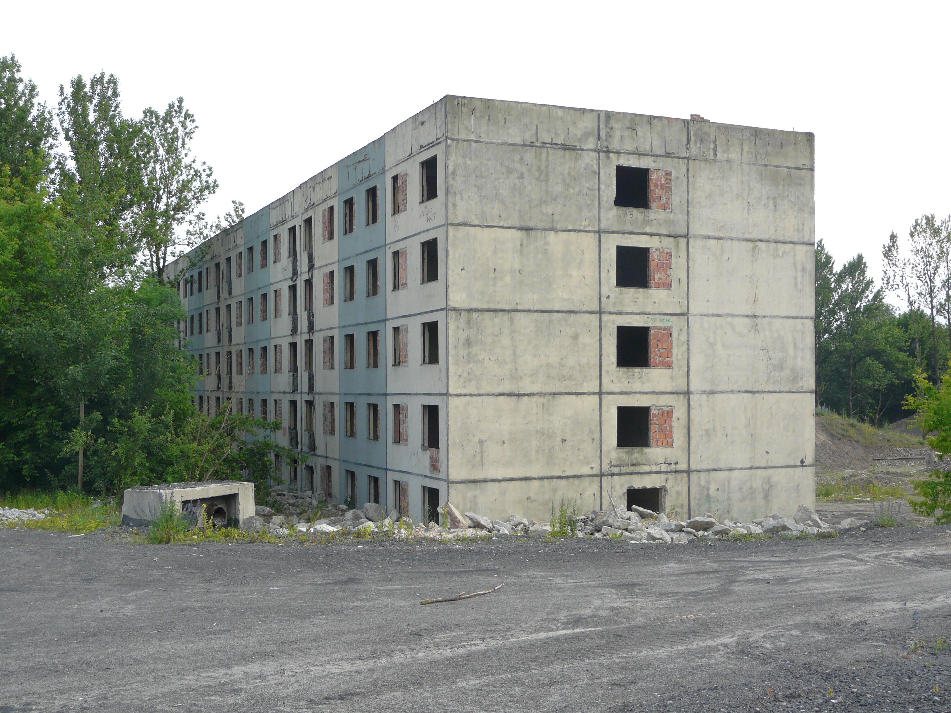 Dom Gornika, Janów-Nikiszowiec